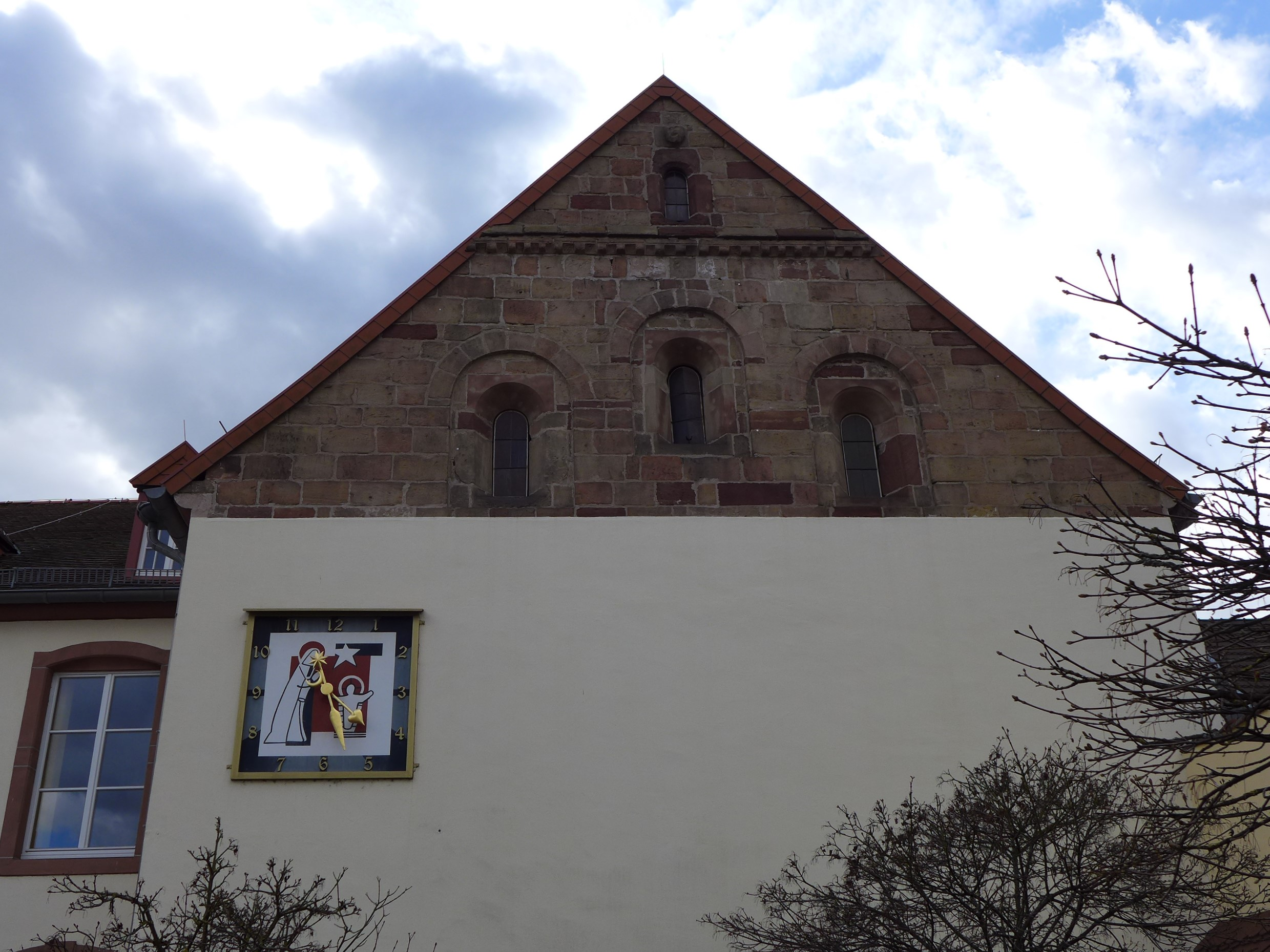 Ehemalige adelige Frauenabtei Fraulautern, romanischer Innengiebel der im Jahr 1895 abgebrochenen Klosterkirche, jetzt Außengiebel der Grundschule